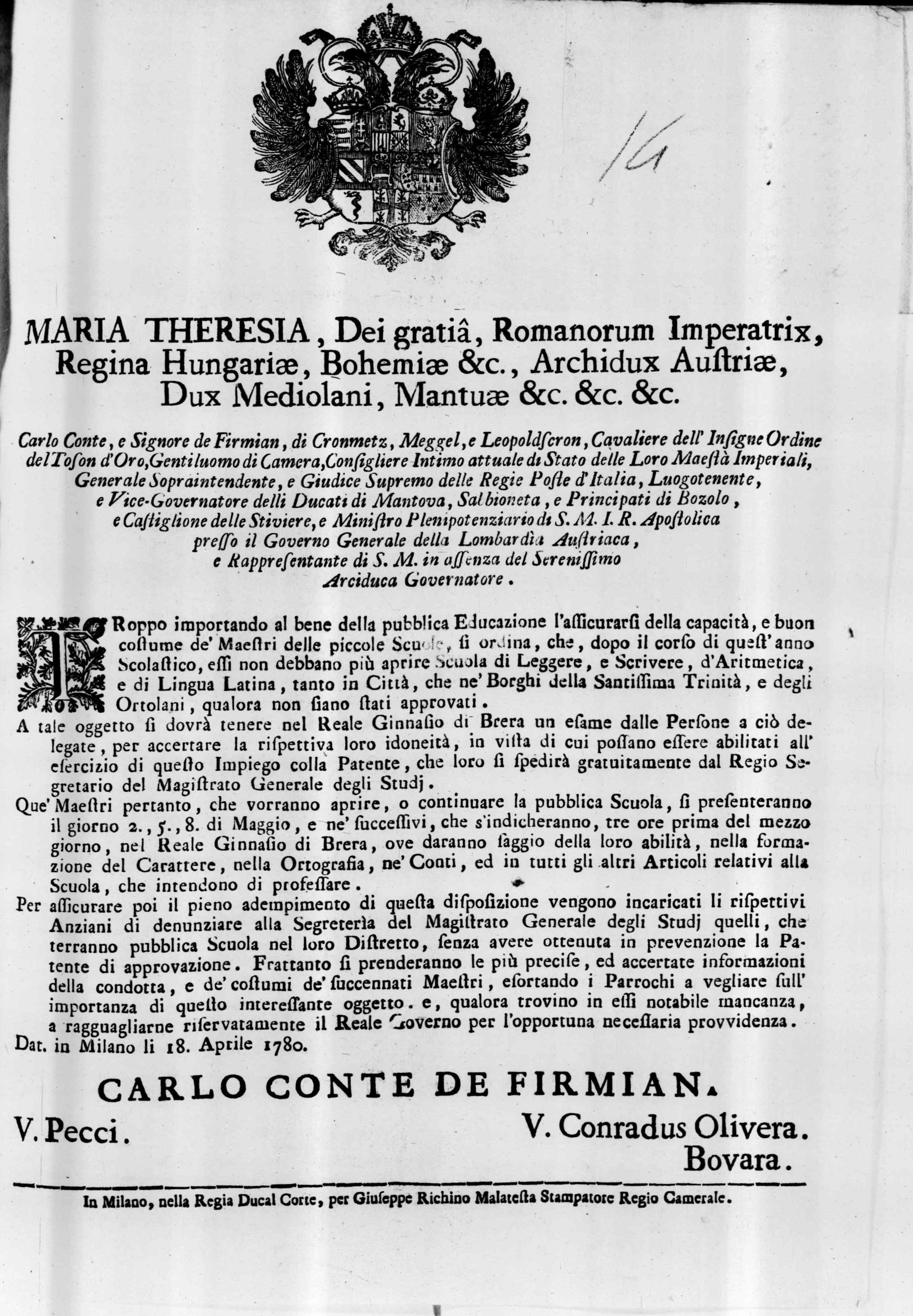 Frontespizio